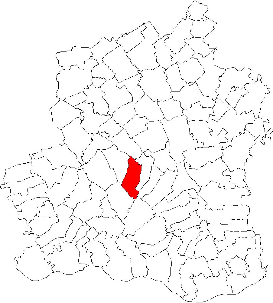 Categorie:Hărţi ale judeţului Teleorman